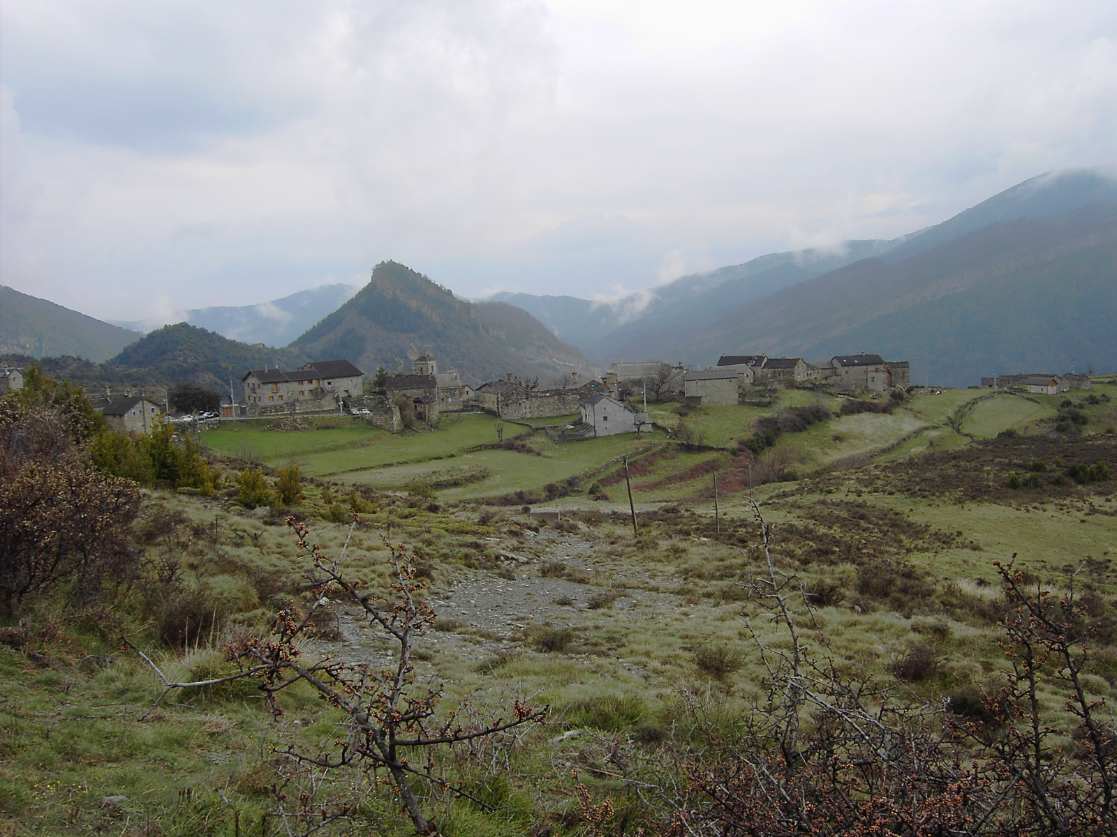 El pueblo sobrarbés de Buerba, perteneciente al municipio de Fanlo, en el Valle de Vió.